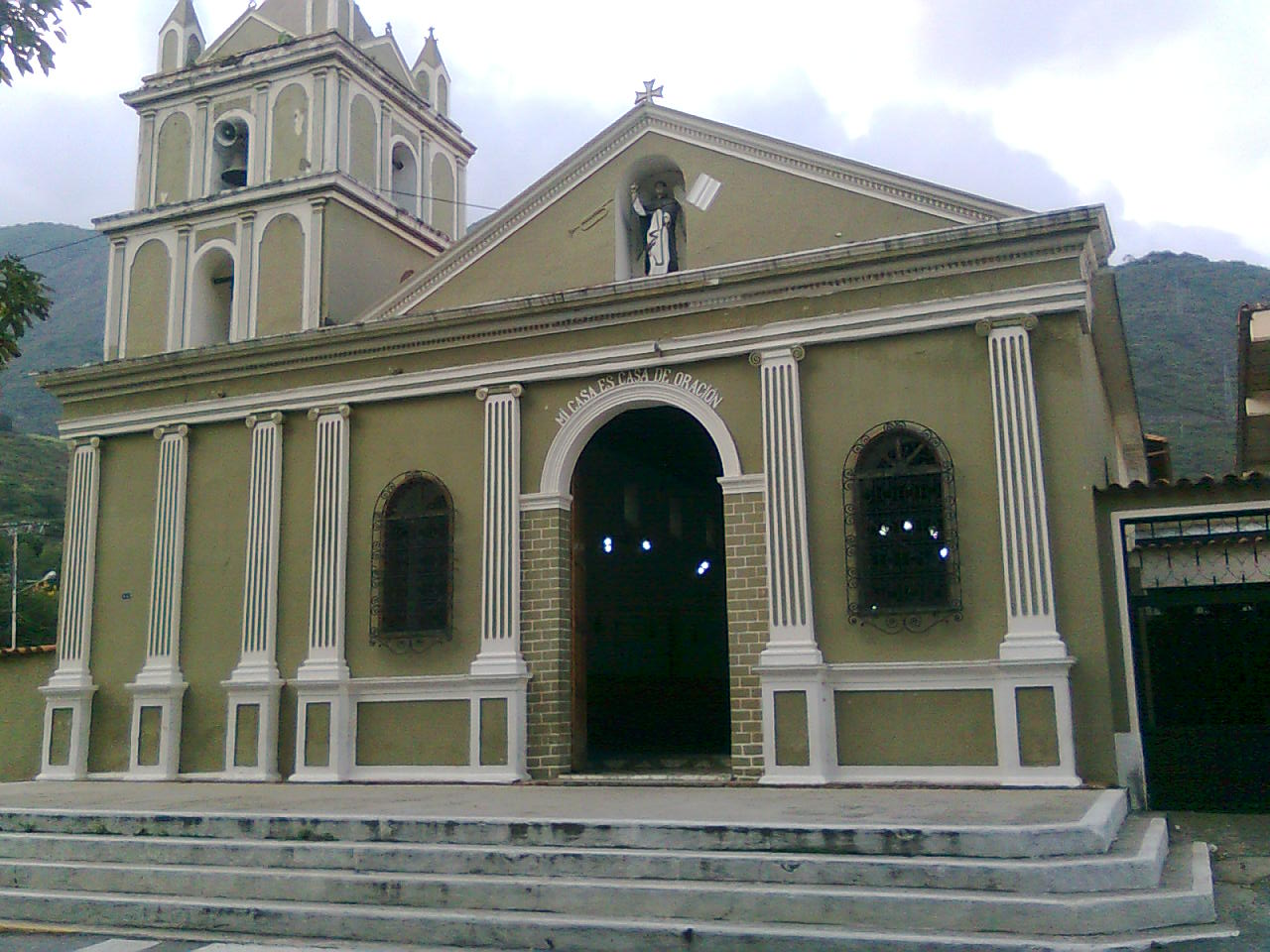 Iglesia de San Vicente Ferrer de la Playa. edo. Mérida